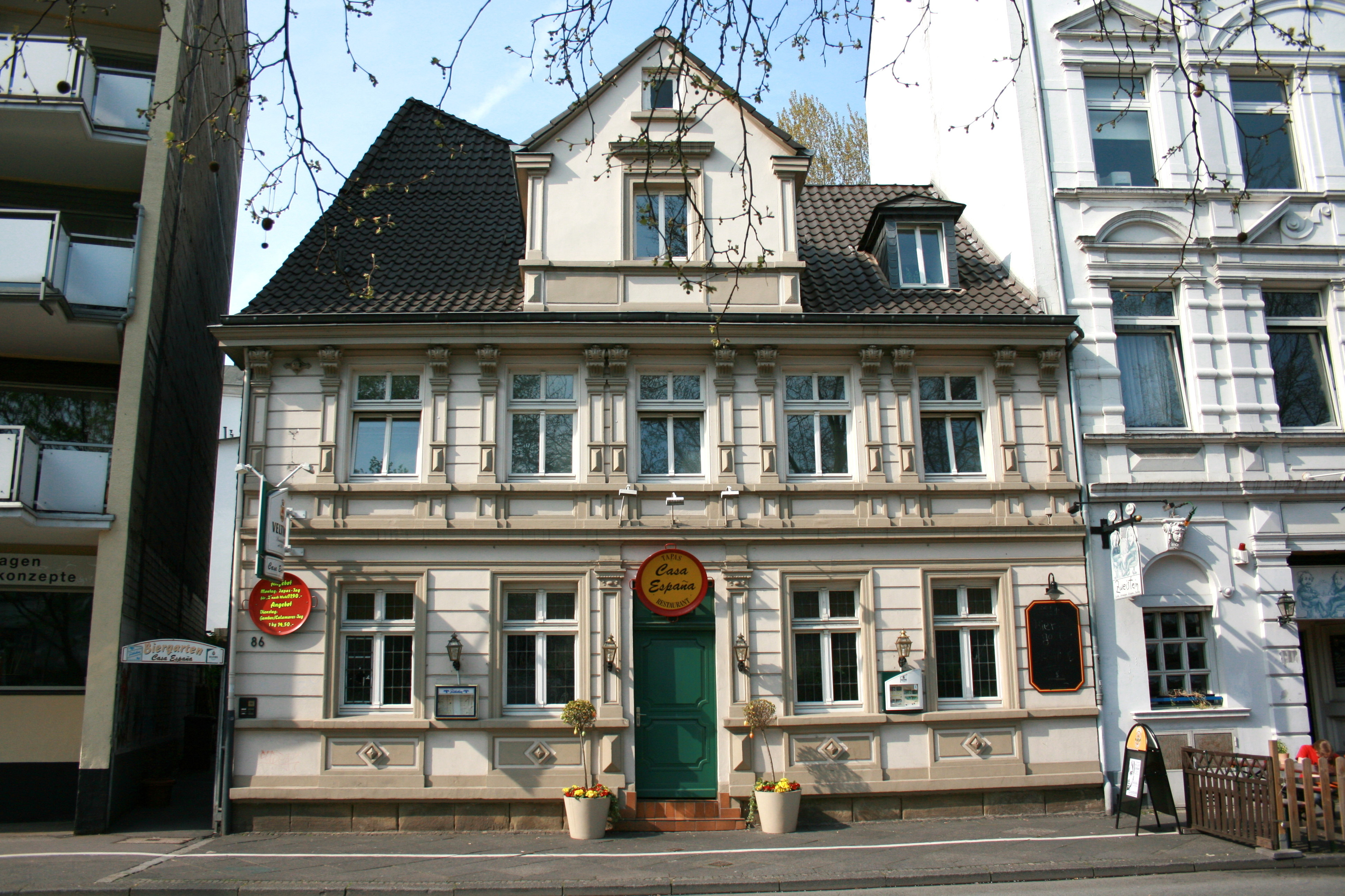 Aue in Wuppertal